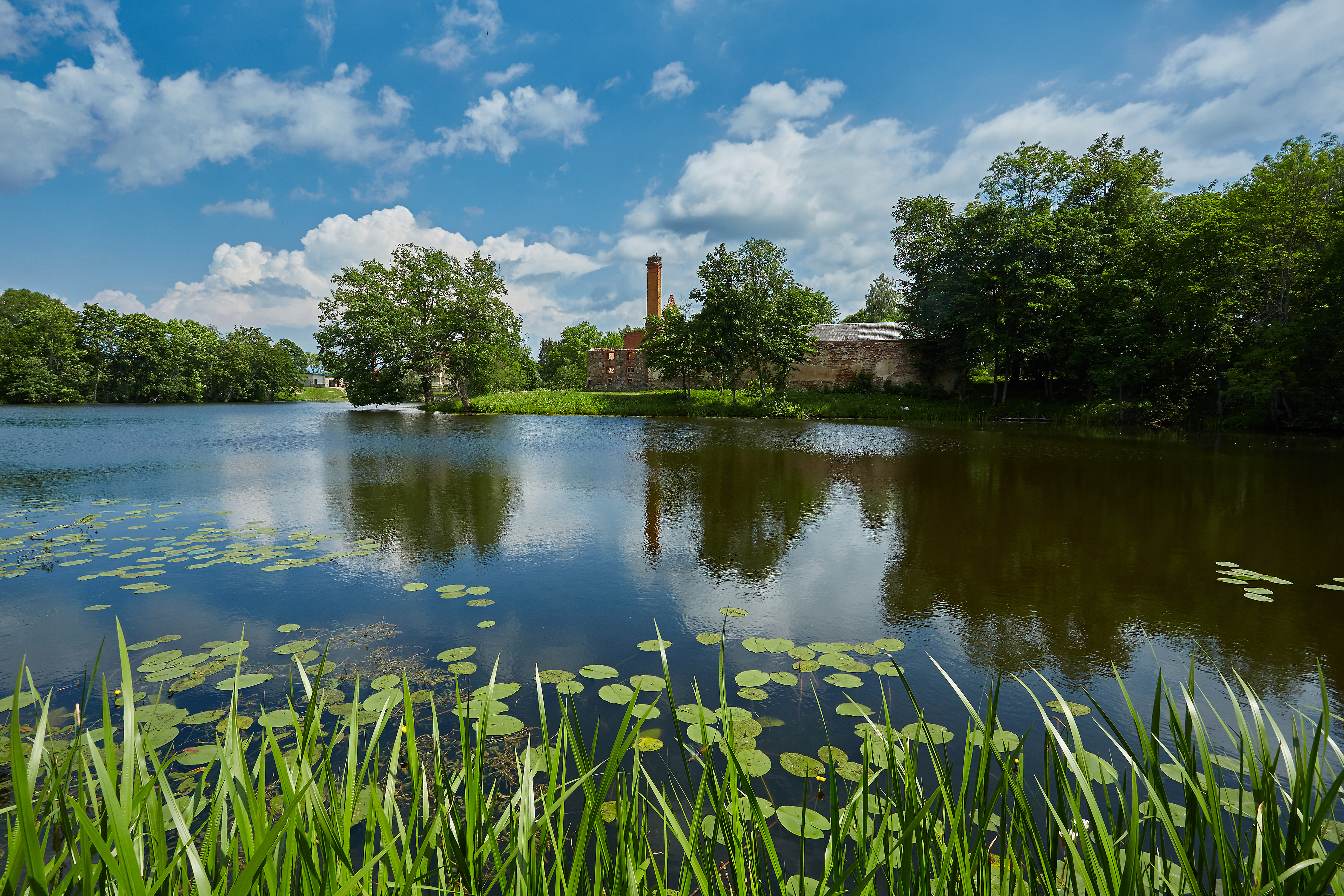 Viitina Alajärv Võrumaal